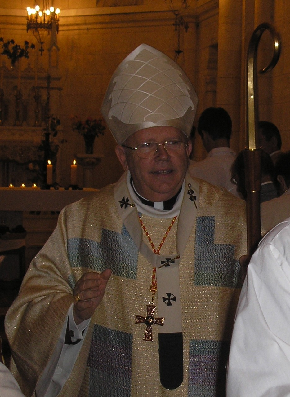 Le Cardinal Jean-Pierre Ricard lors d'une d'une célébration dans le diocèse de Bordeaux